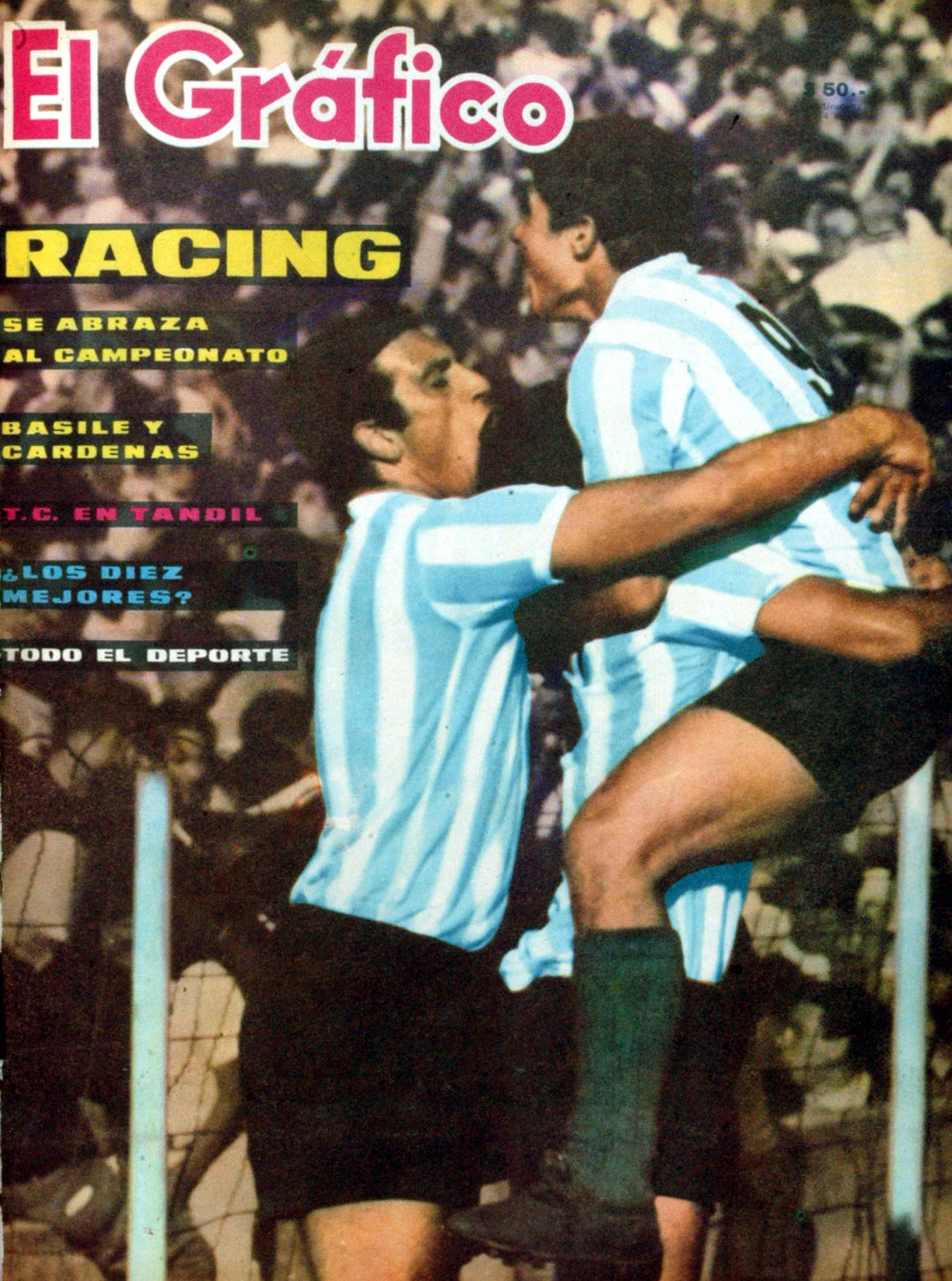 El Grafico del 15 de Noviembre de 1966. Edicion 2458